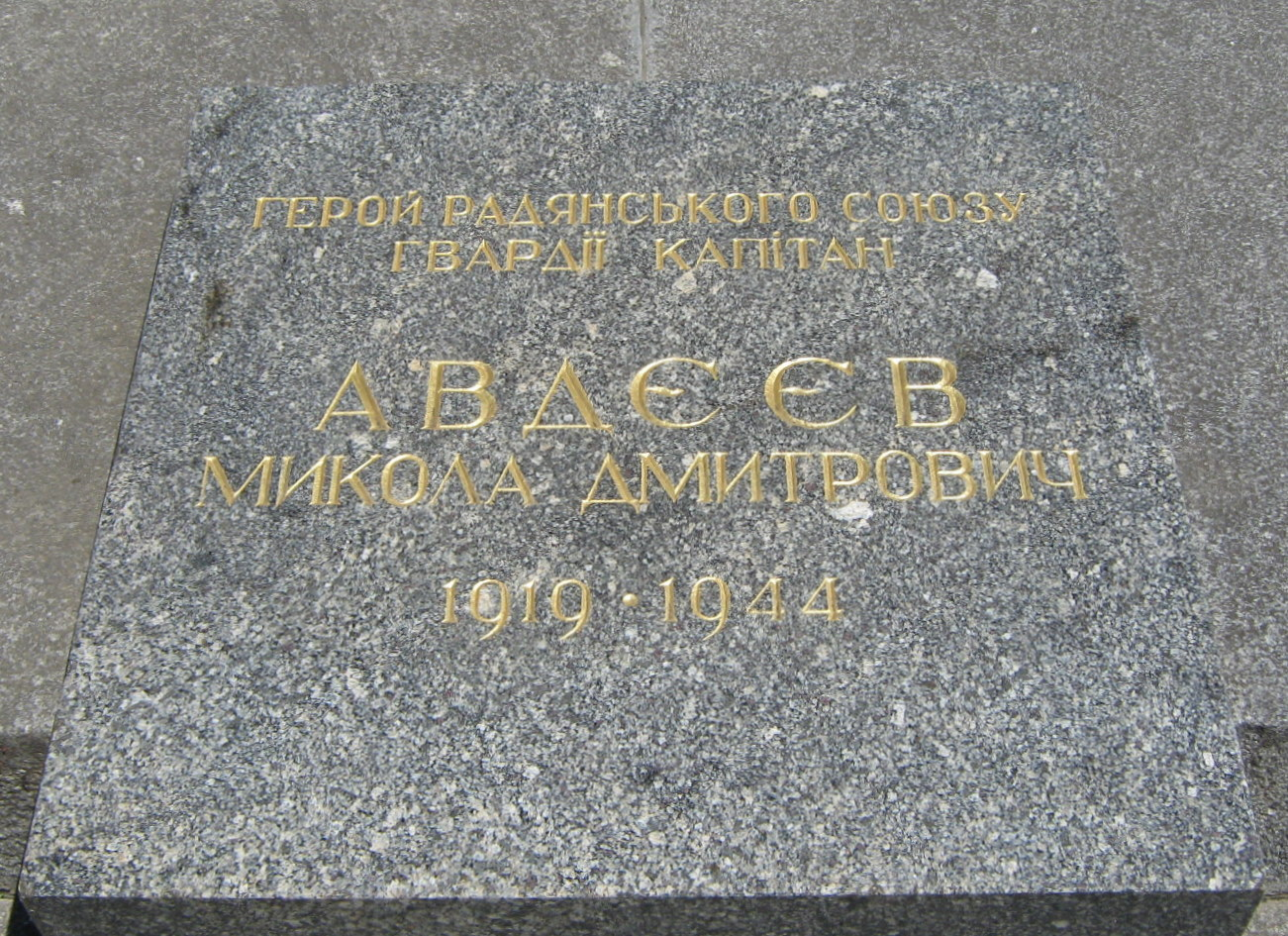 Меморіал Вічної Слави. Авдєєв